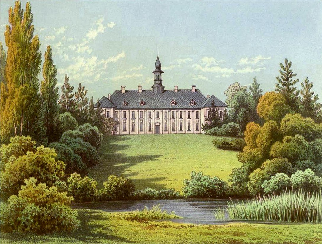 Schloss Hohenpriessnitz, Lithografie aus dem 19. Jahrhundert